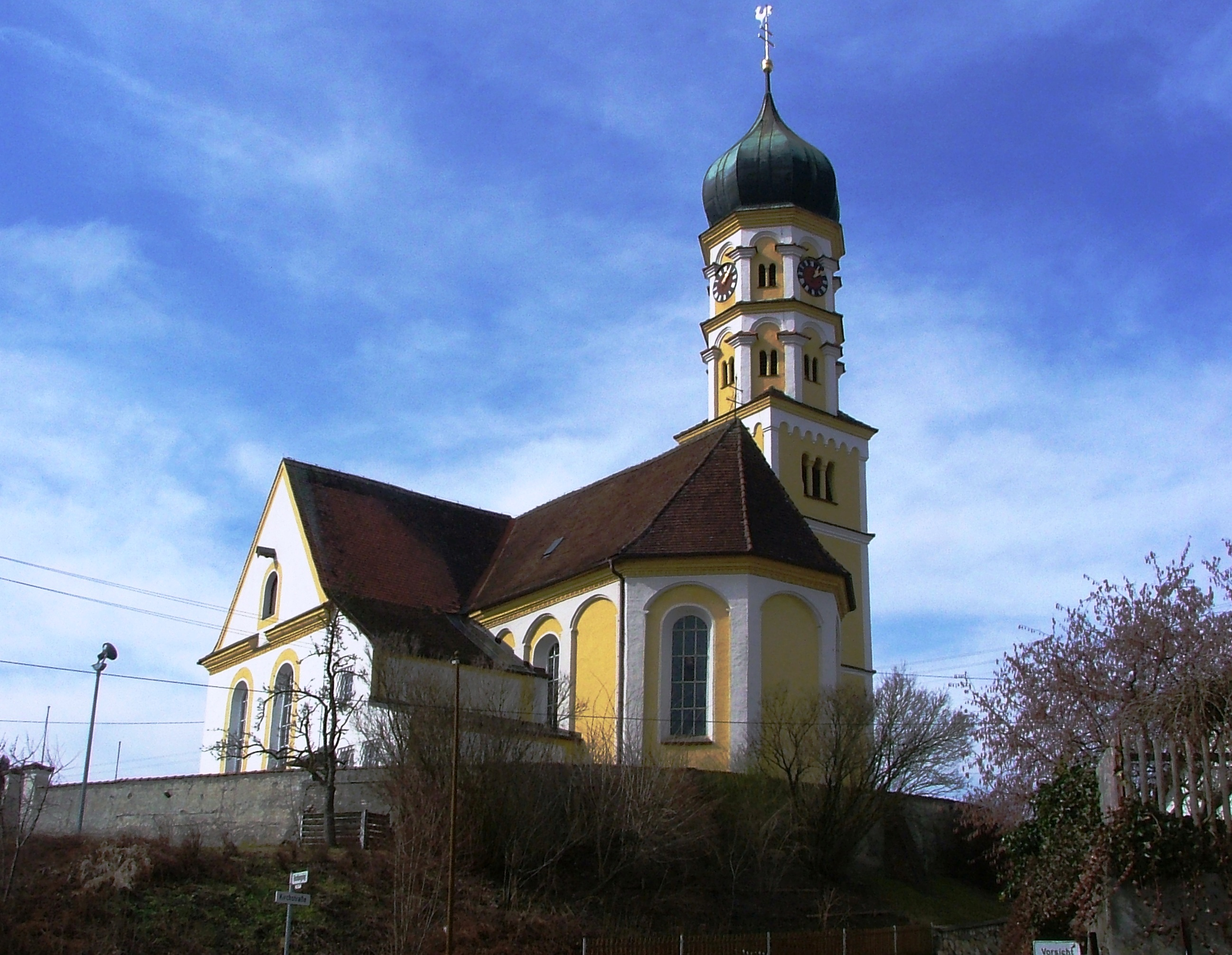 Kellmünz